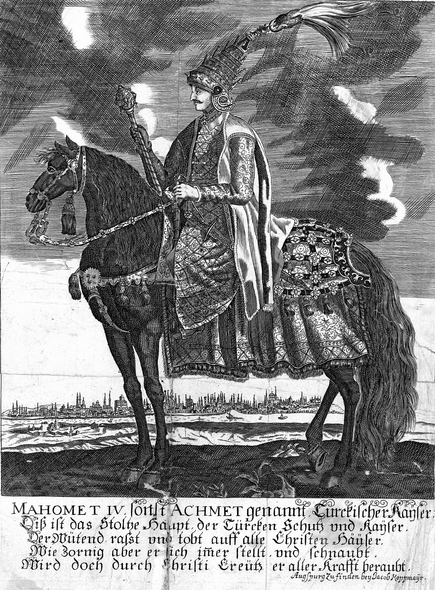 IV. Mehmed (Isztambul, 1642. január 2. – Drinápoly, 1693. január 6.) oszmán szultán 1648-tól 1687-ig. Úgy ismert a történelemben, mint Mehmed Avci (a vadász), mivel nagyon szeretett vadászni.